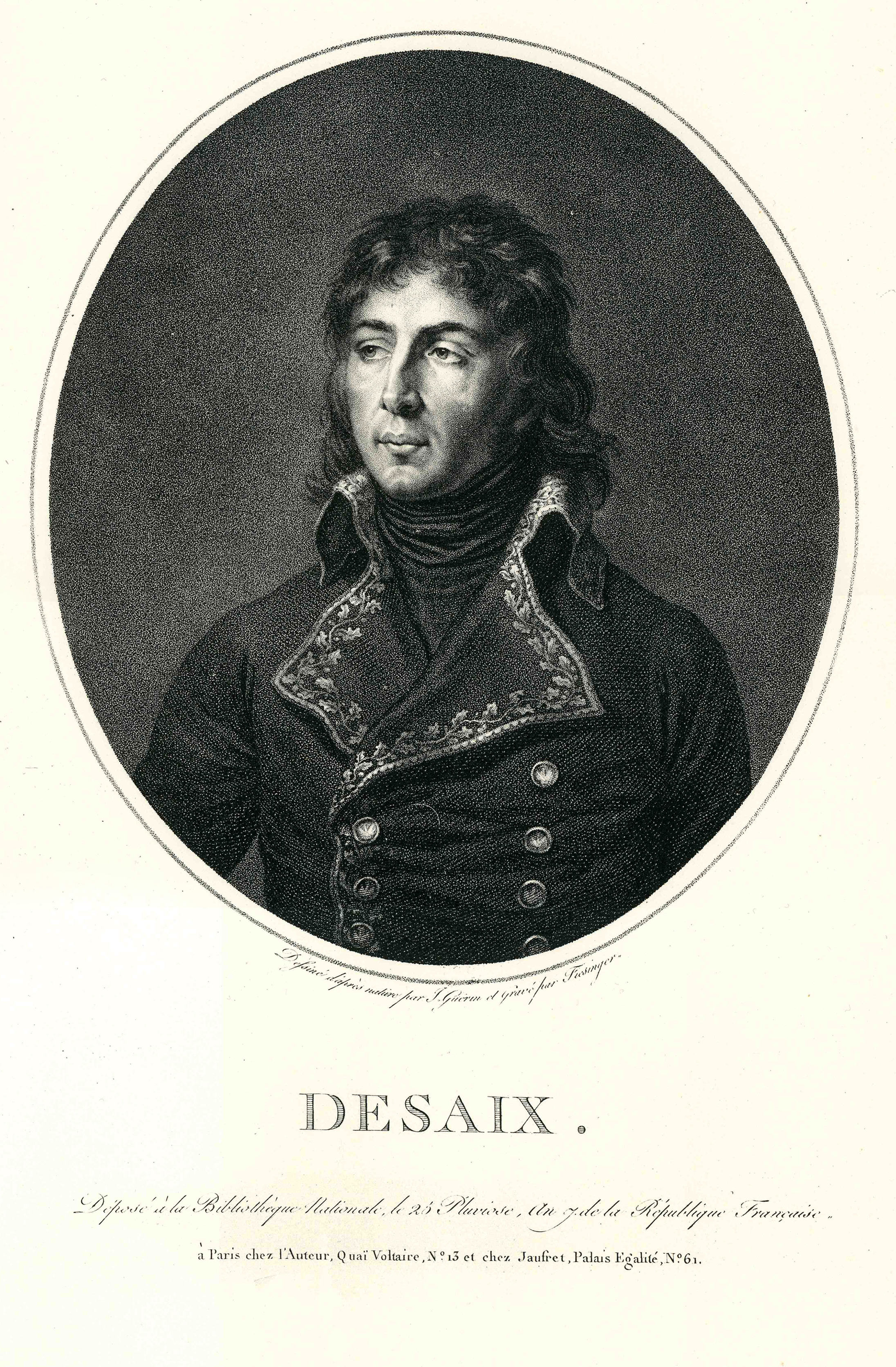 Portrait of Louis Charles Antoine Desaix (1768-1800)